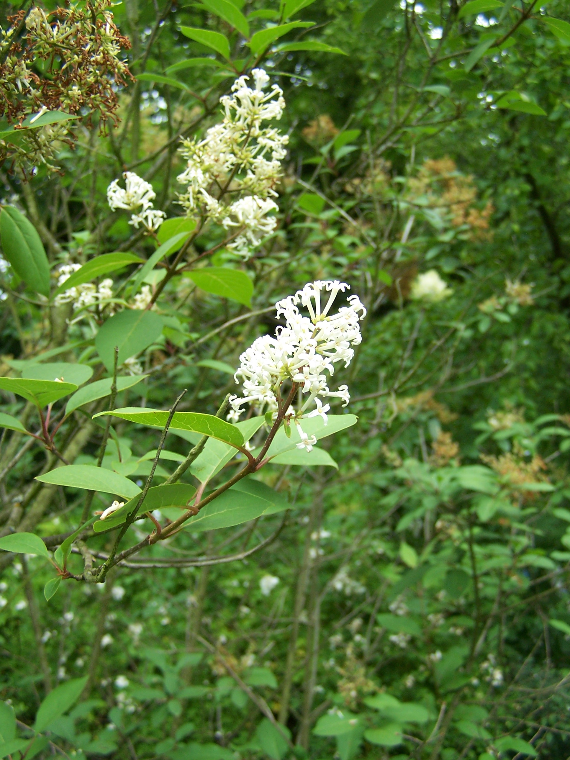 Syringa emodi (West of Himalaya) 17 juin 2006 Vieux jardin botanique de Göttingen